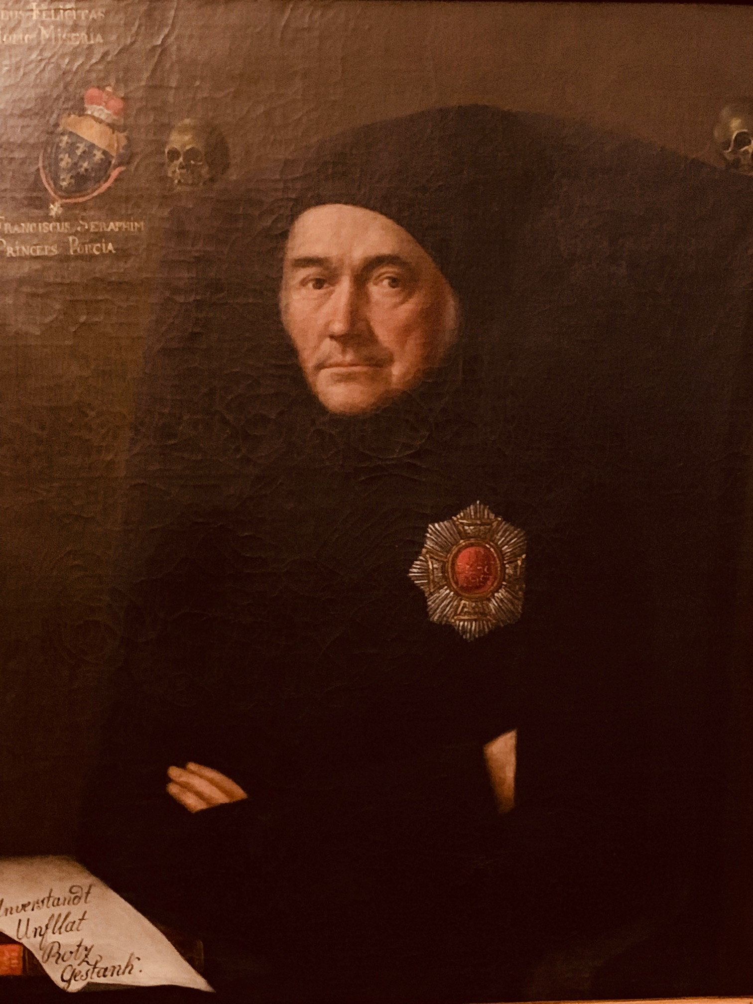 Il quadro del XVIII secolo, raffigura Francesco Serafino (1753-1827), IX° principe di Porcia e Brugnera.